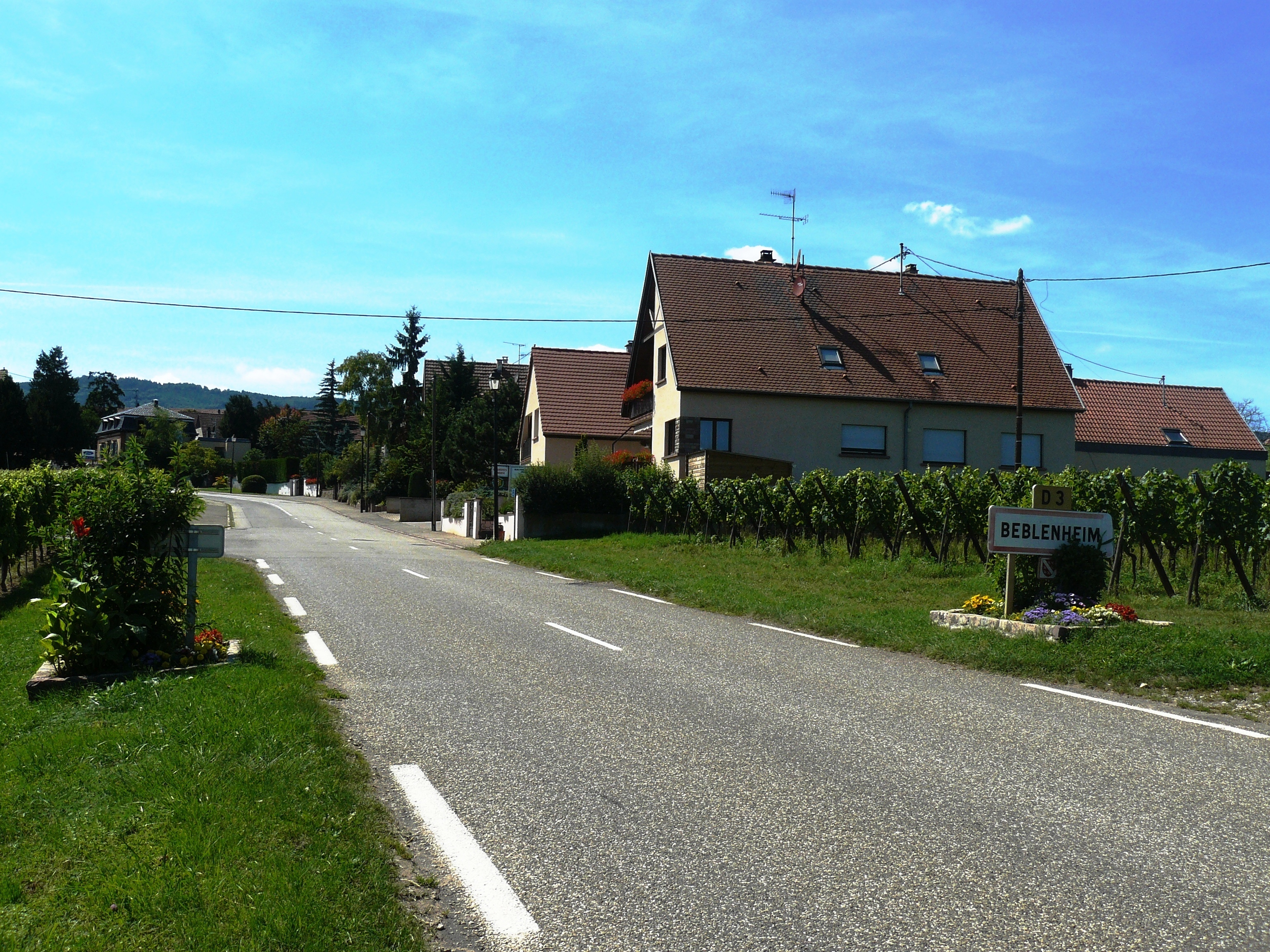 Entrée du village de Beblenheim par la D3